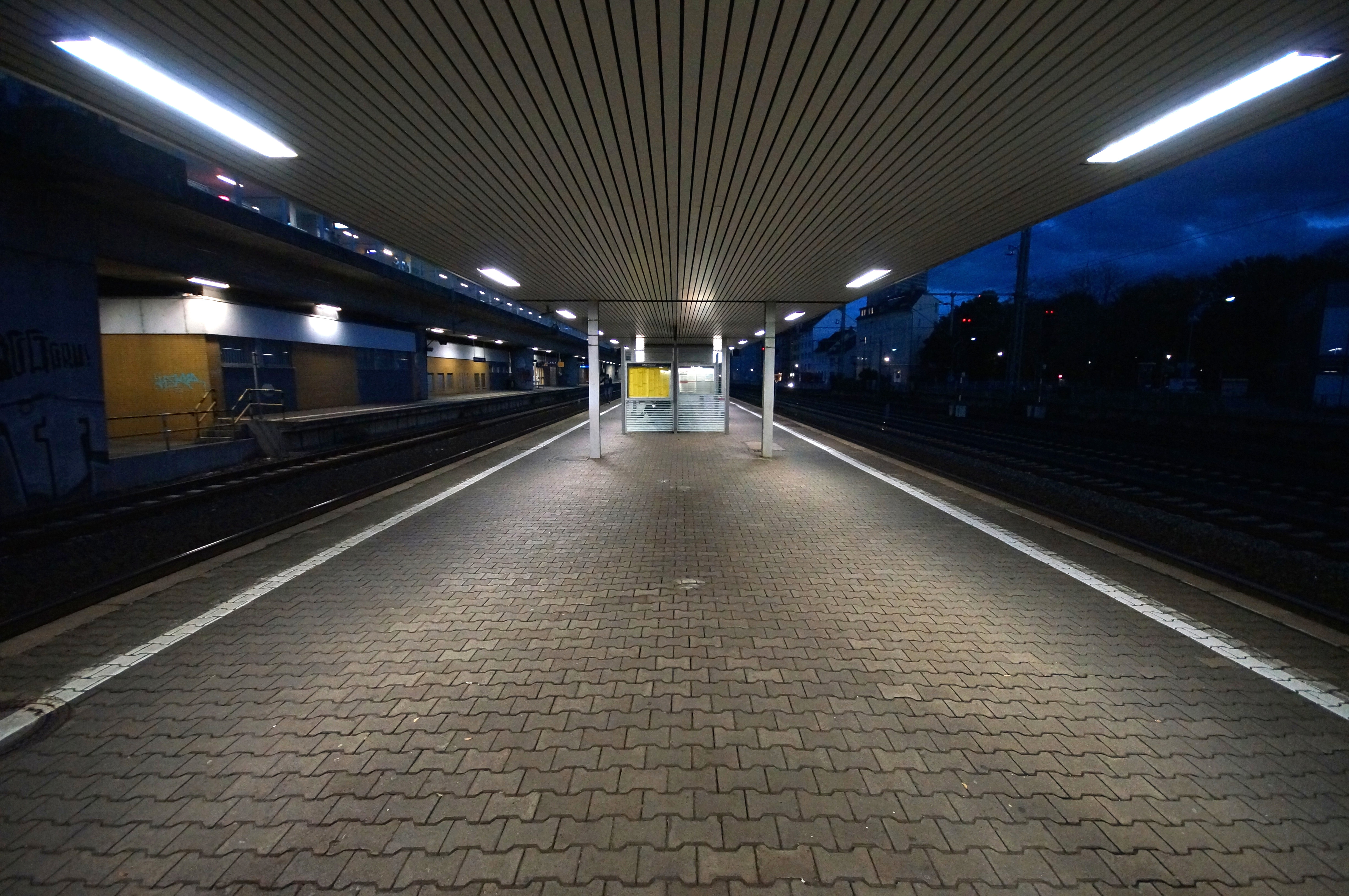 Die Bahnsteige zu den Gleisen 4 und 5 des Bahnhofs Frankfurt (Main) West. Hier halten die Züge des Regionalverkehrs.